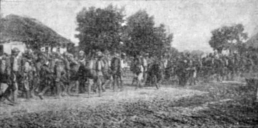 D - Trupe romane in drum spre frontul de la Namoloasa II 437